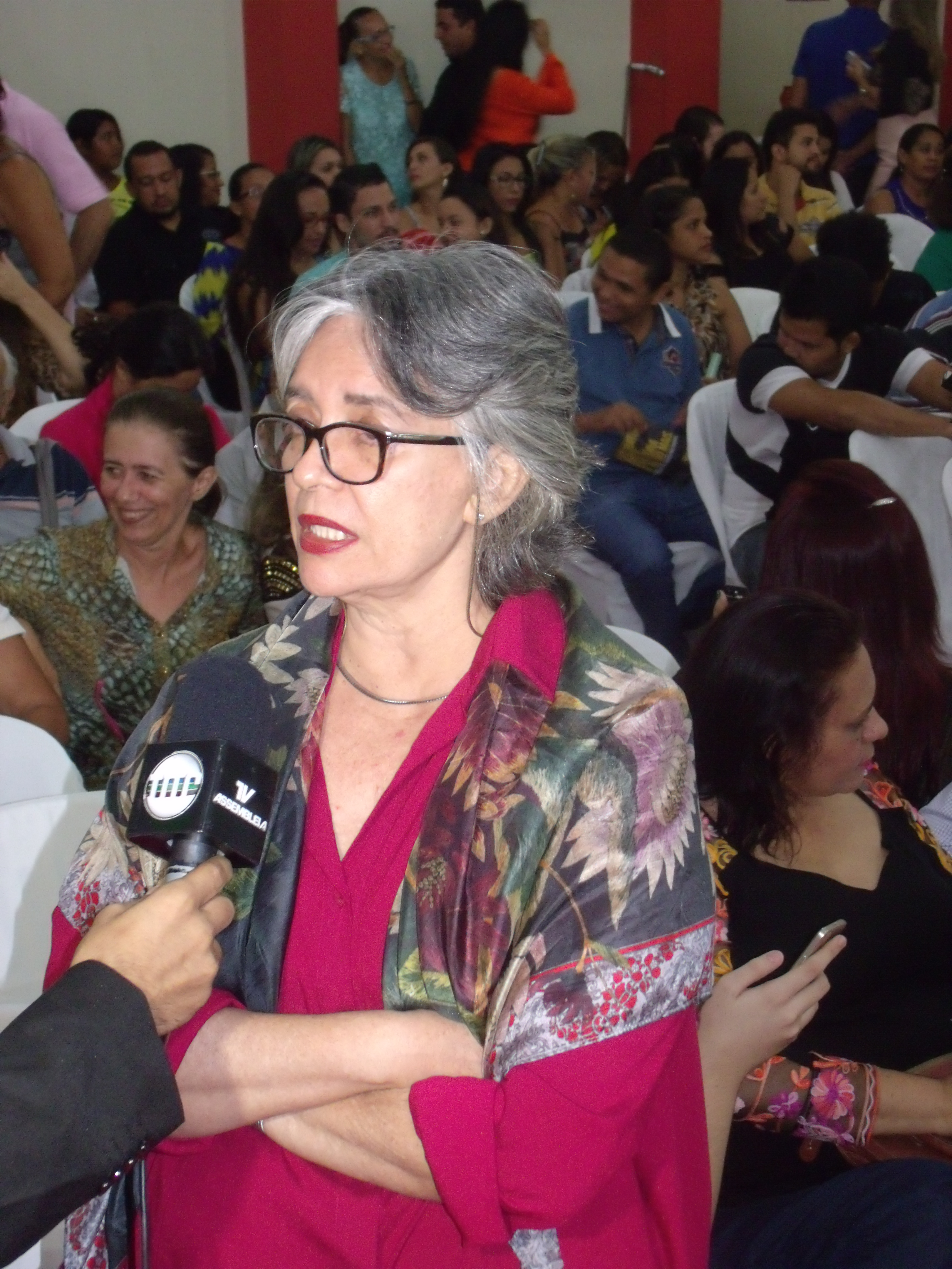 Escritora Ana Miranda sendo entrevistada pela TV Assembleia Legislativa do Piauí.